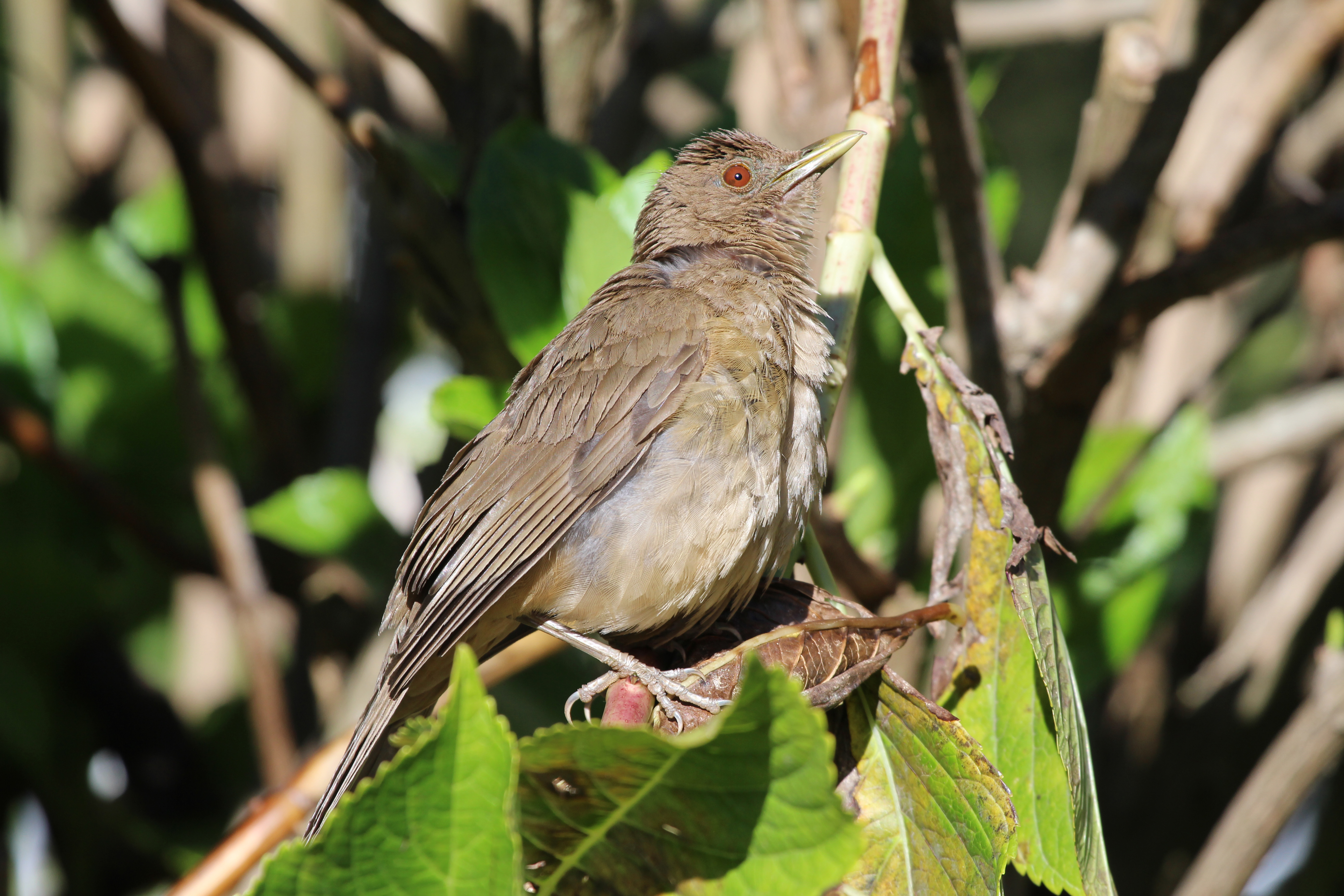 Image d'un merle fauve a la province de Cartago Costa Rica, juste apres un orage pendant la saison des pluies.